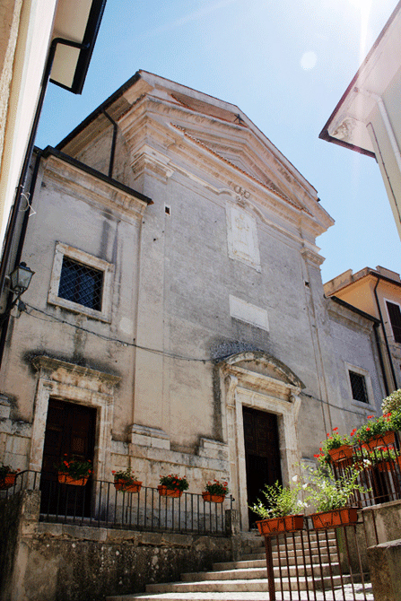 Collegiata di San Lorenzo L.M., Picisisco